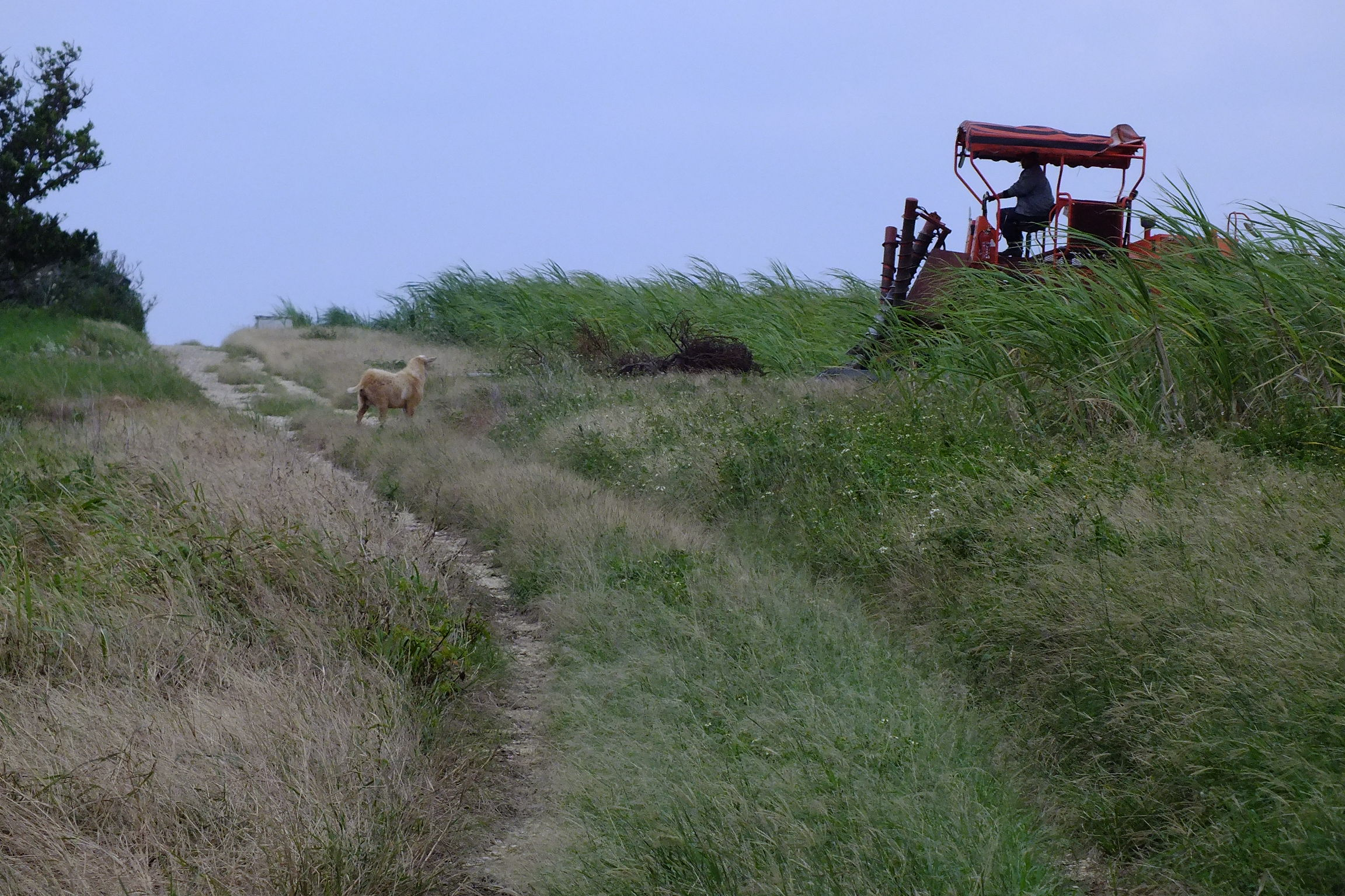 2015-12-17 Haterumajima Goat